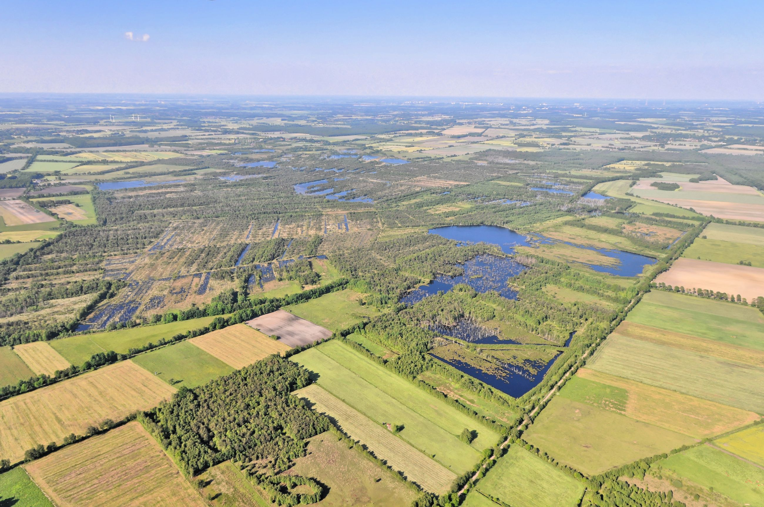 Überführungsflug vom Flugplatz Nordholz-Spieka über Lüneburg, Potsdam zum Flugplatz Schwarzheide-Schipkau